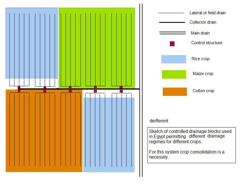 Contolled composite drainage in Egypt